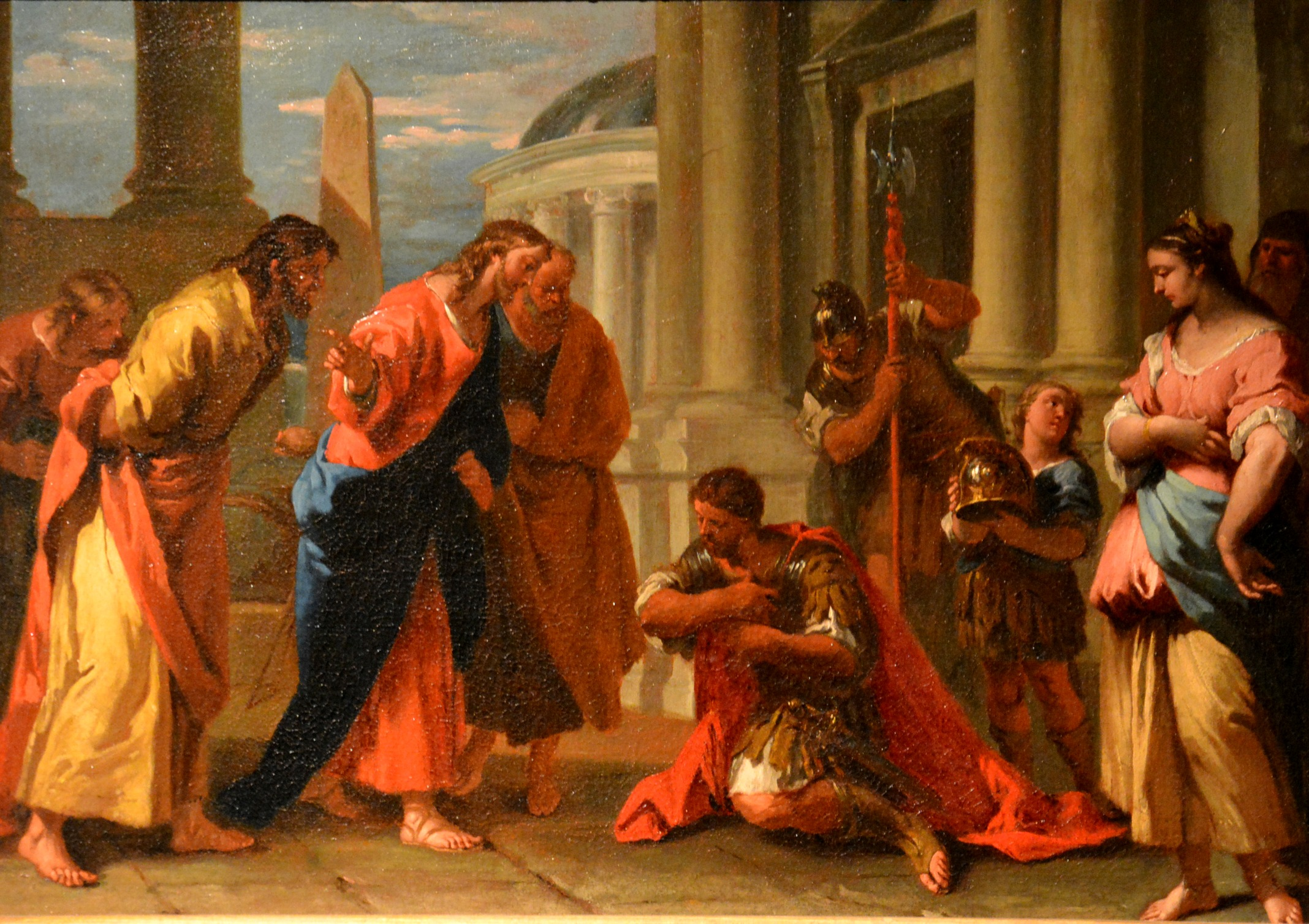 Vedi titolo